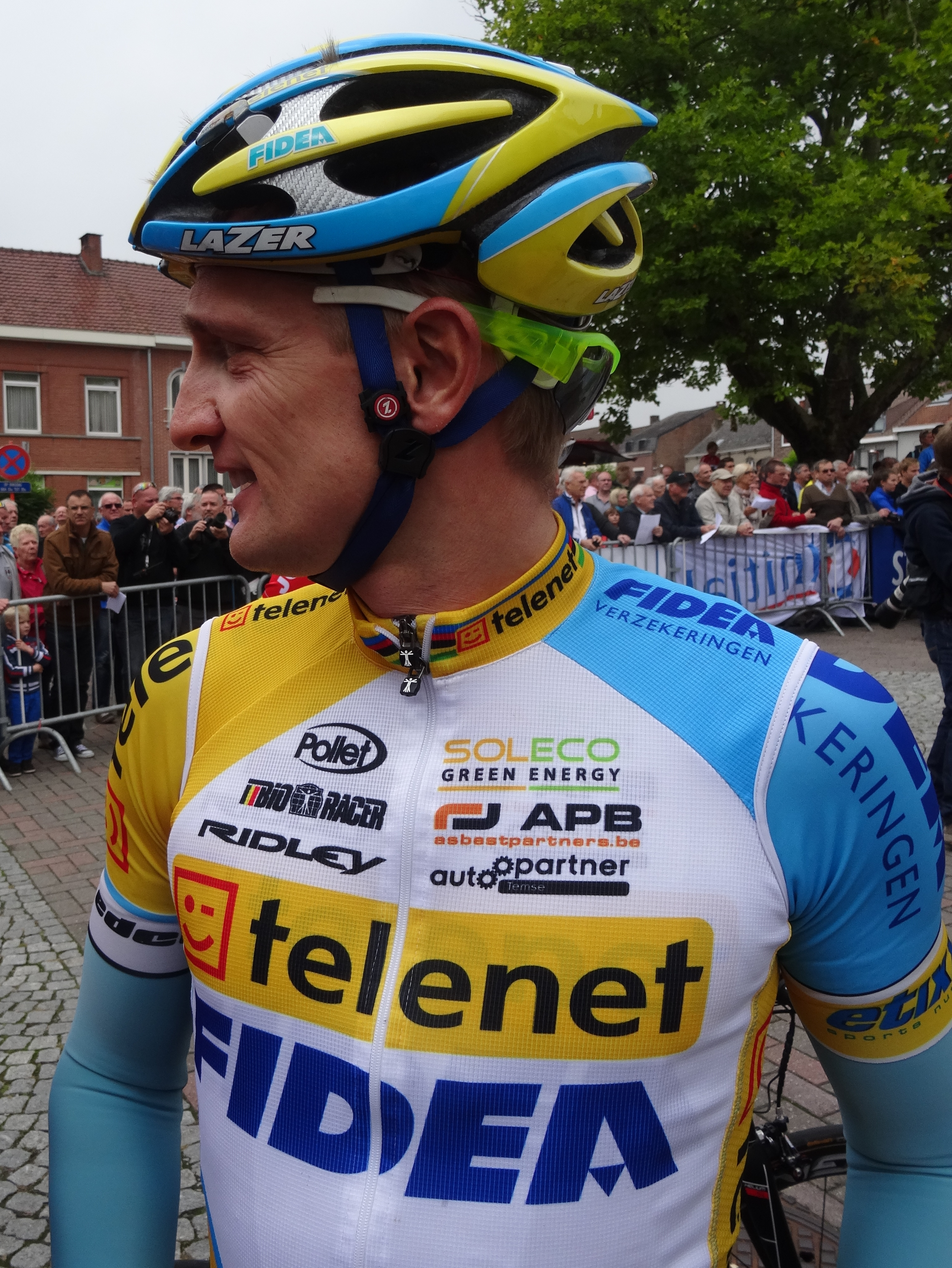 Reportage photographique réalisé le mercredi 27 août à l'occasion du départ de la Druivenkoers Overijse 2014 à Huldenberg, Belgique.